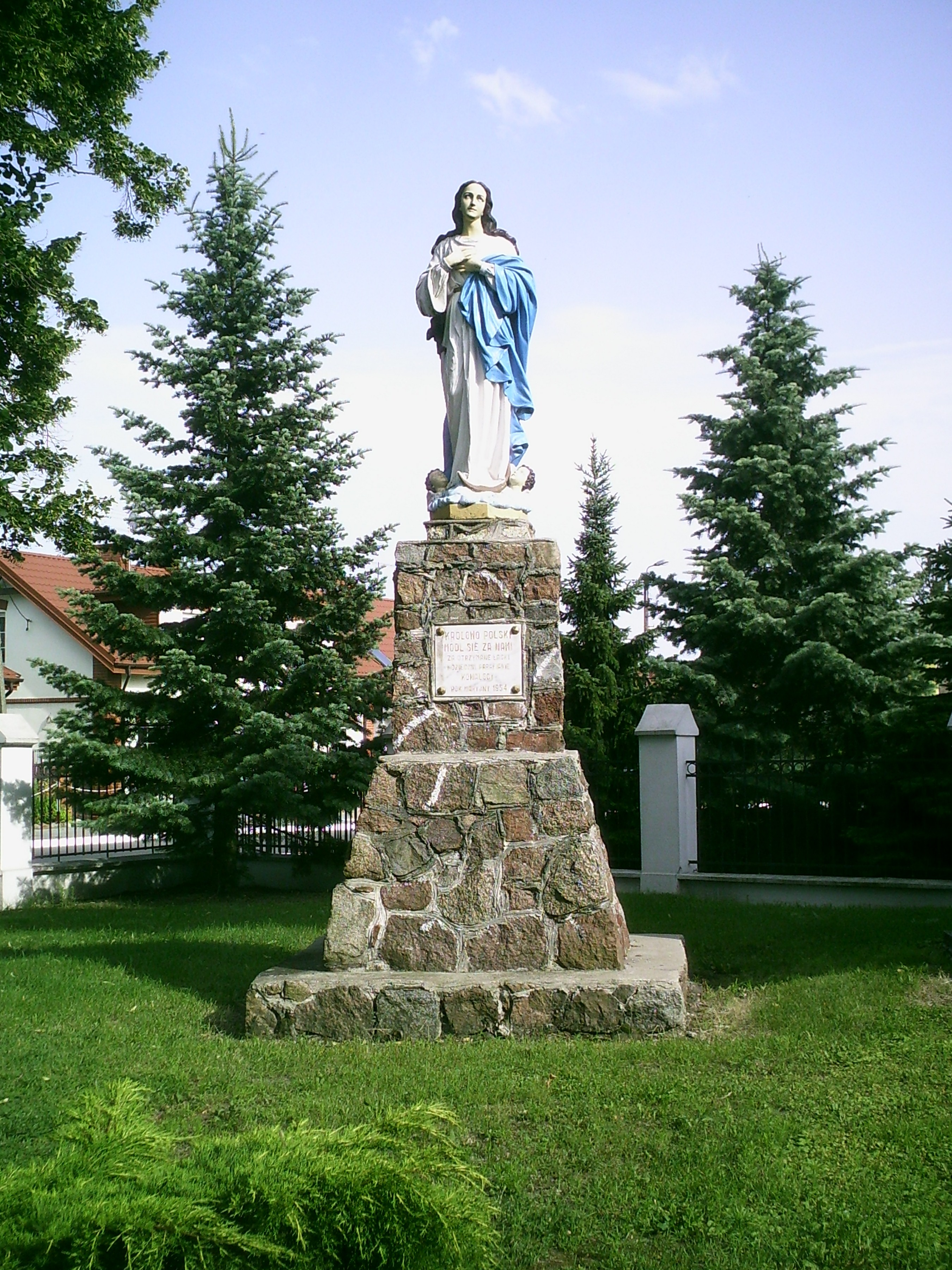 Kościół parafialny p.w. św Urszuli w Kowalu - figura NMP na dziedzińcu kościelnym